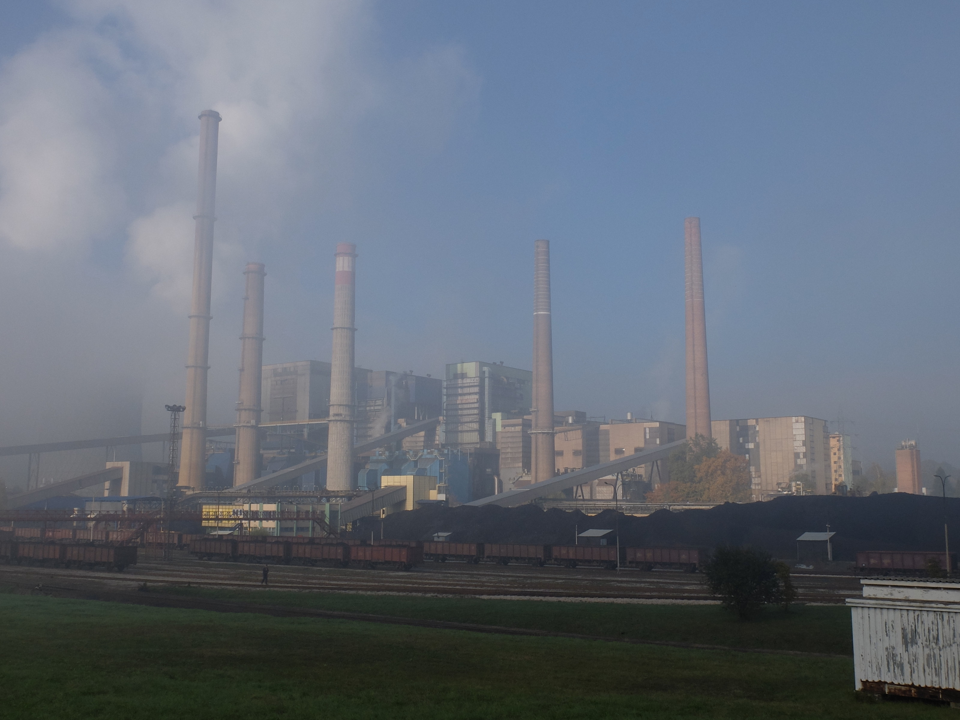 Kohlekraftwerk inTuzla